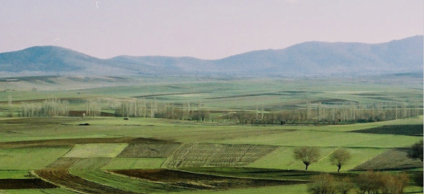 Kızılcaören Güneyinde Kızılcaören Deresi Boyunca Sıralanan Söğüt (Salix) ve Titrek Kavak (Populus Tremula)Birlikleri.